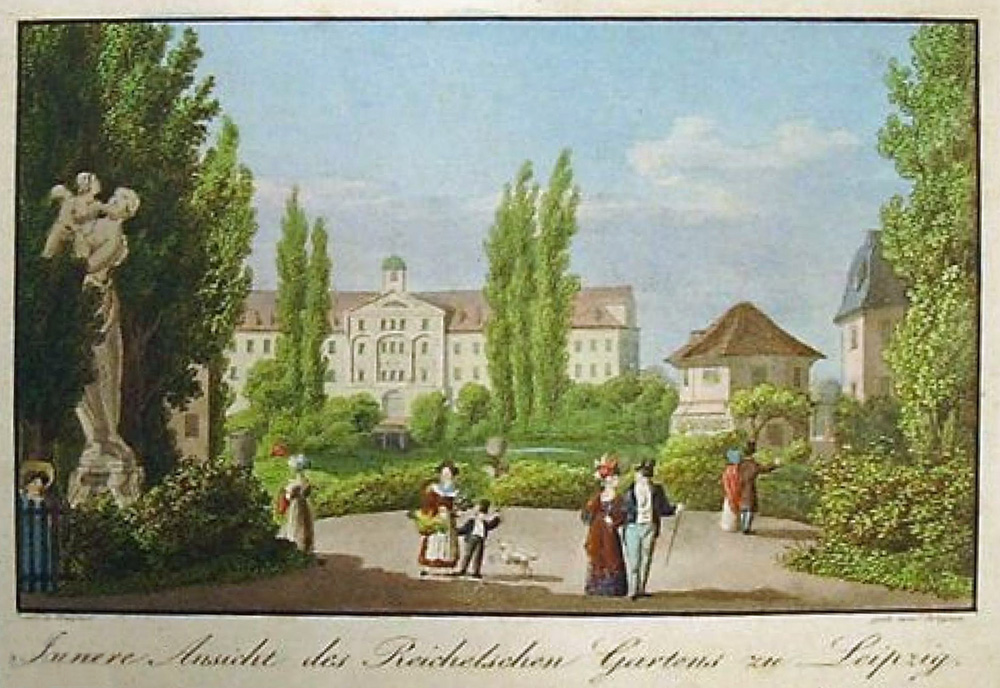 Reichels Garten in Leipzig (ehemals Apels Garten) um 1830 mit dem sogenannten Mittelhaus